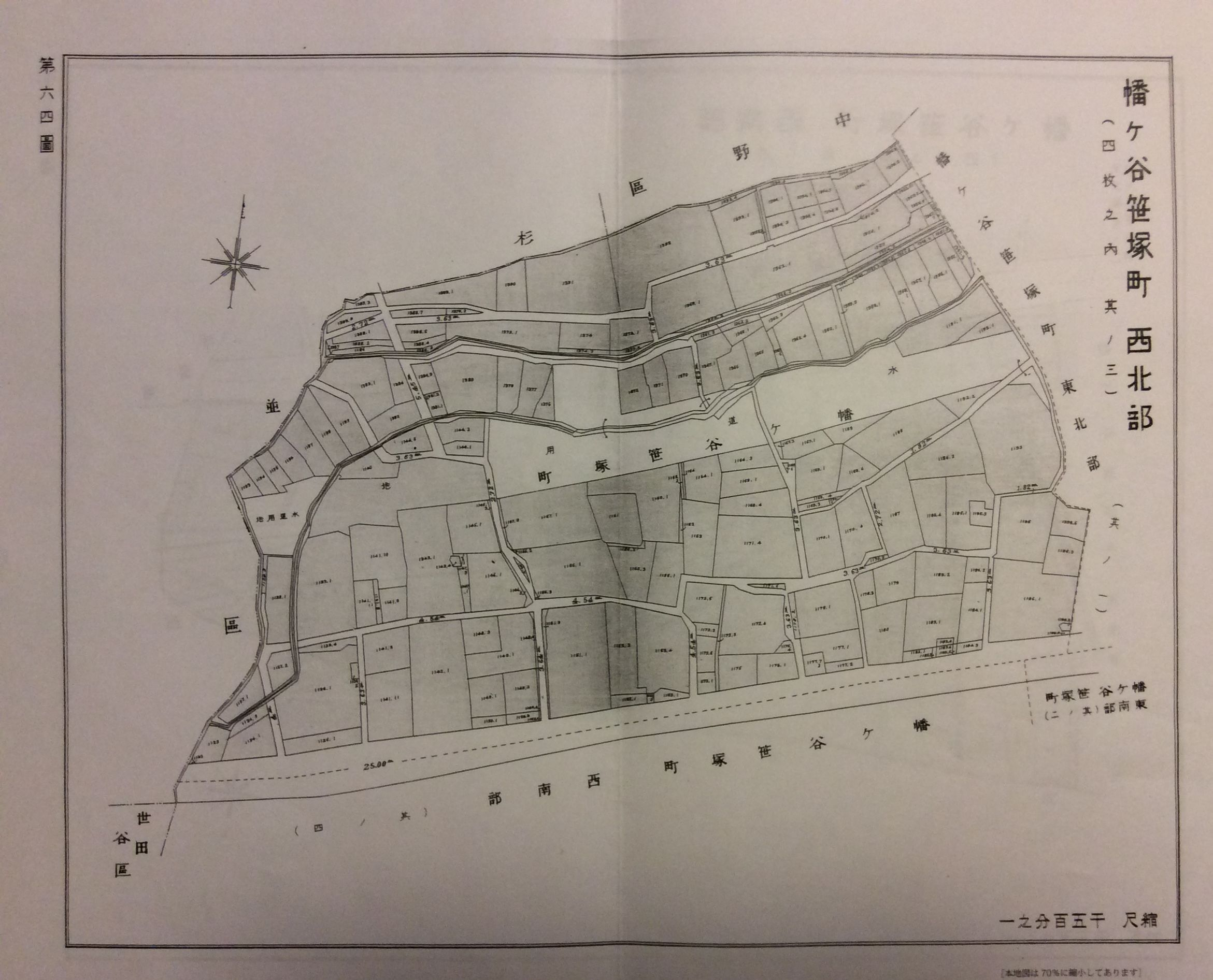 （2014年12月25日撮影）